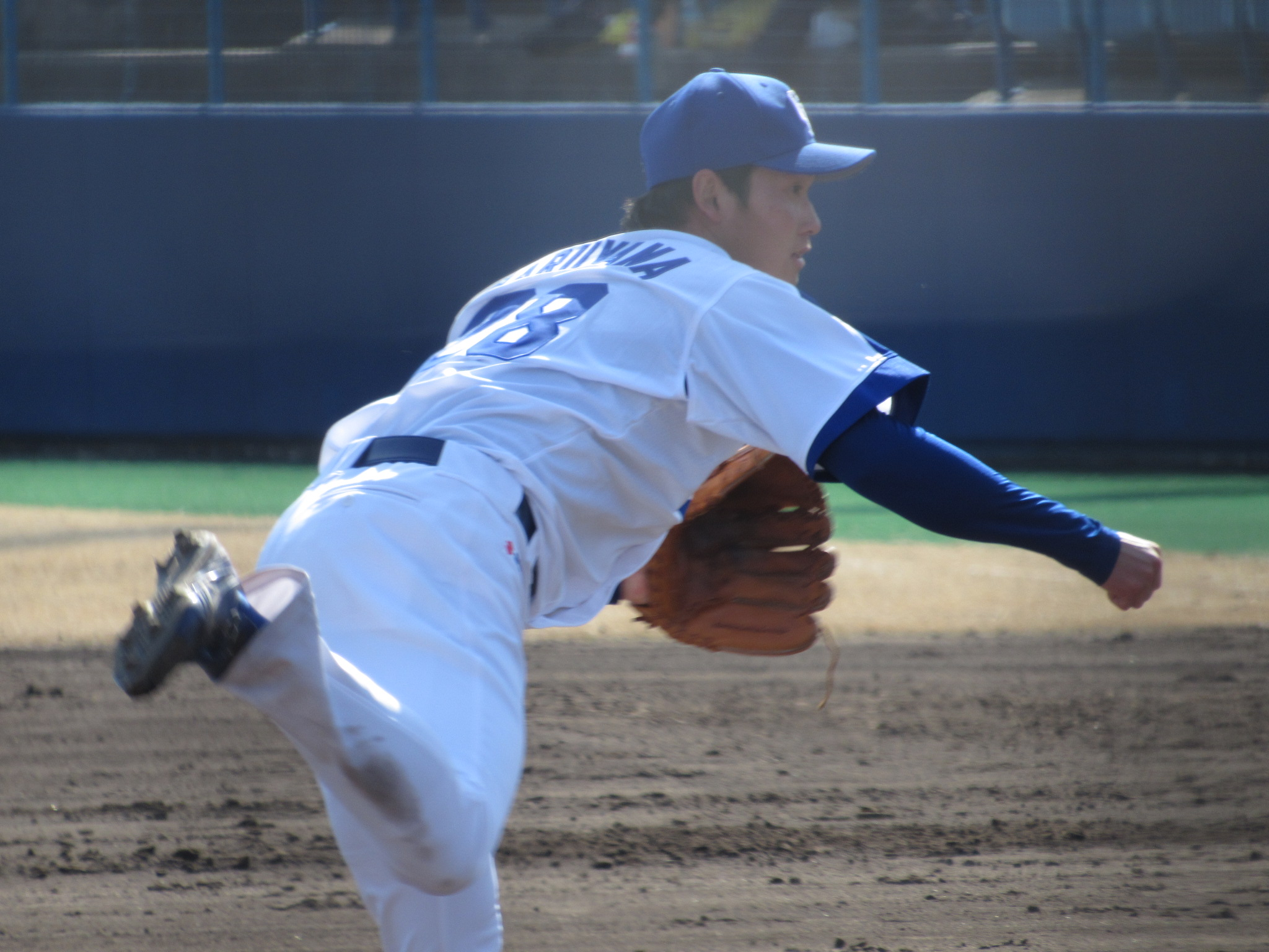 2016.3.4 ナゴヤ球場 初登板